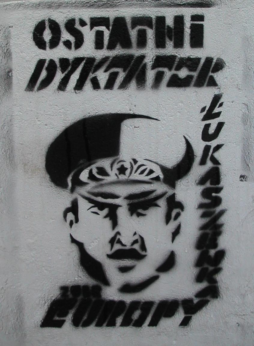 Szablon skierowany przeciwko przywódcy Białorusi Alaksandrowi Łukaszence, namalowany w Warszawie w 2002 roku.